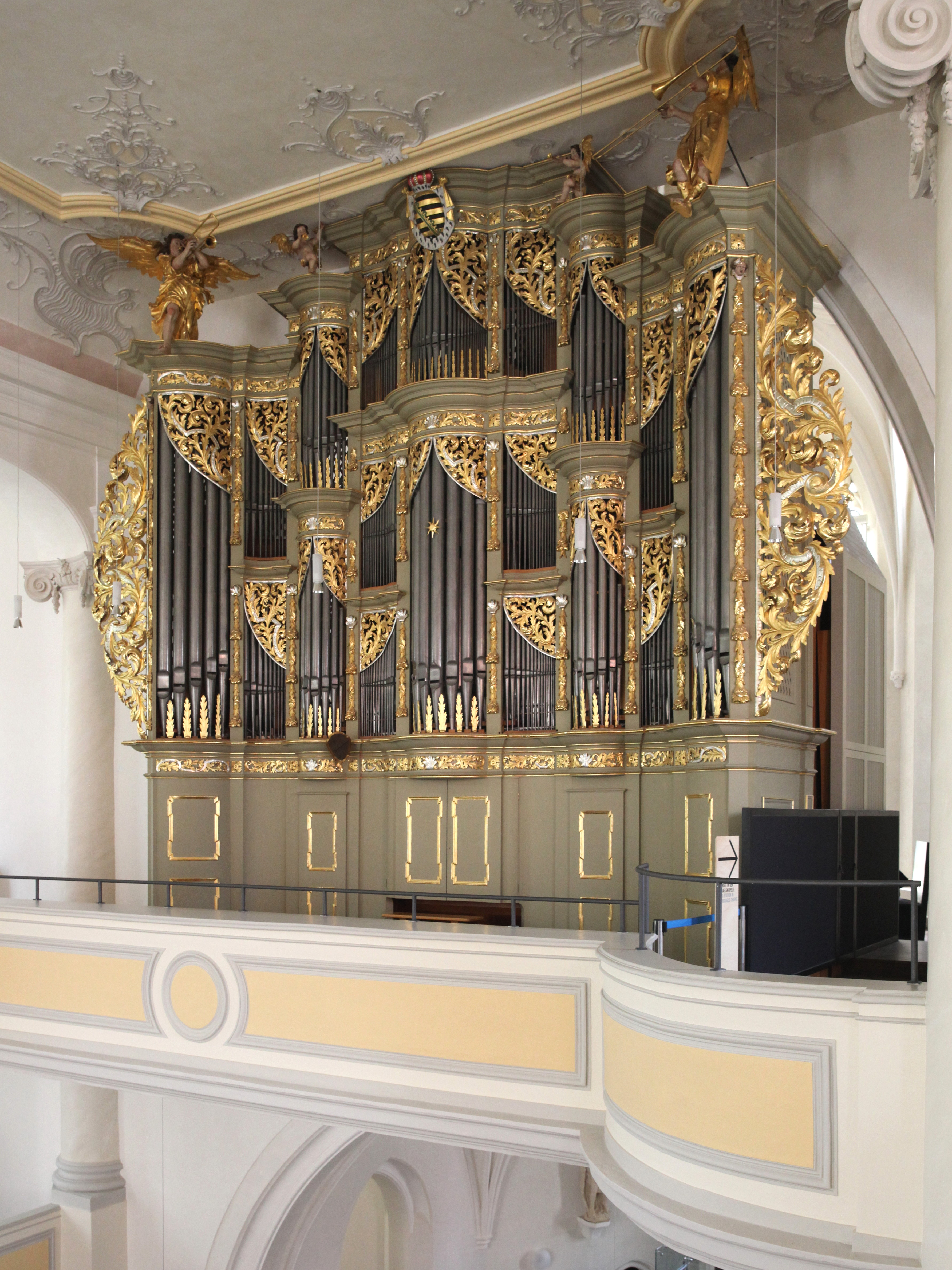 Orgel Morizkirche Coburg